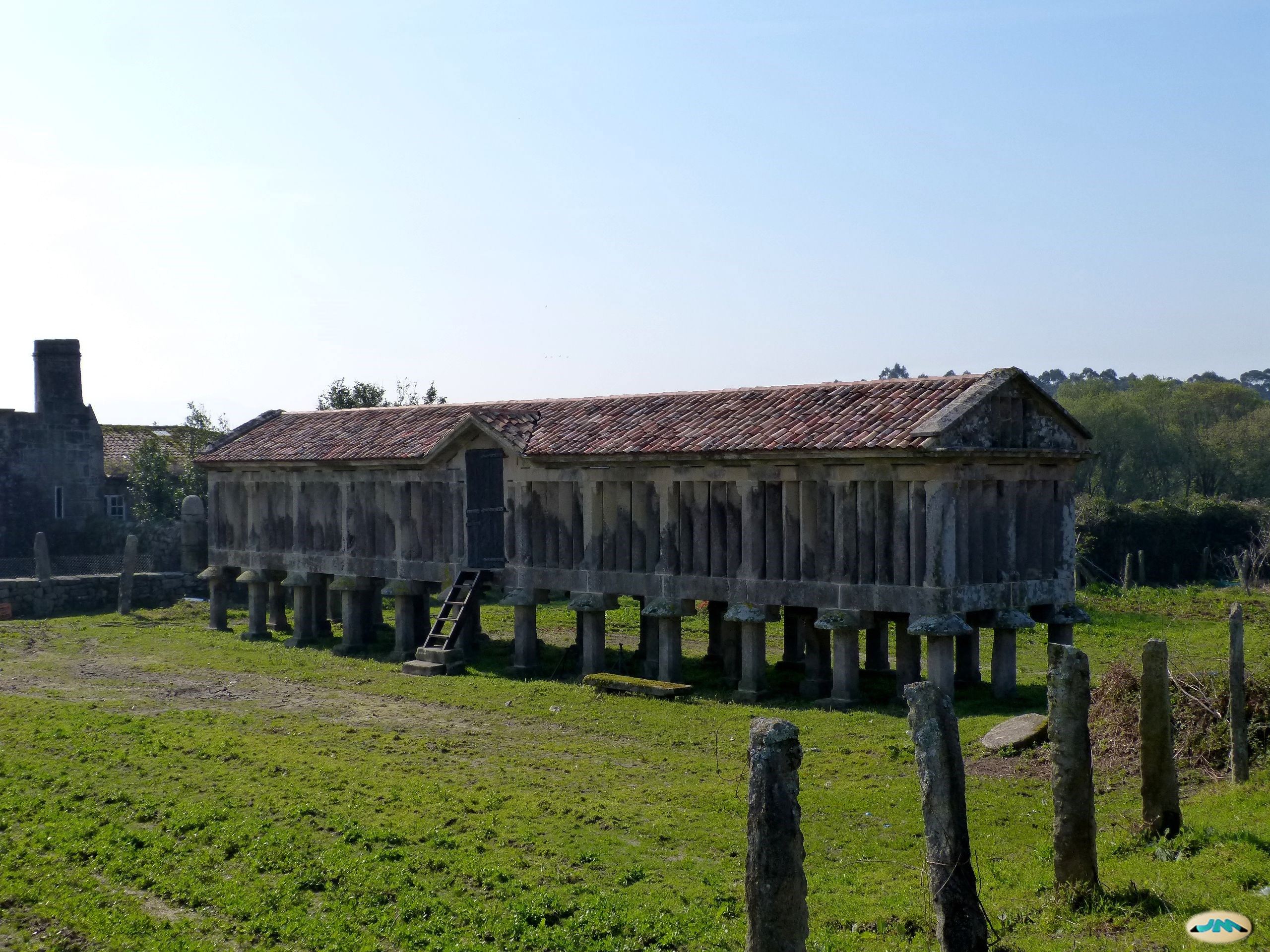 Así está ahora...rehabilitado